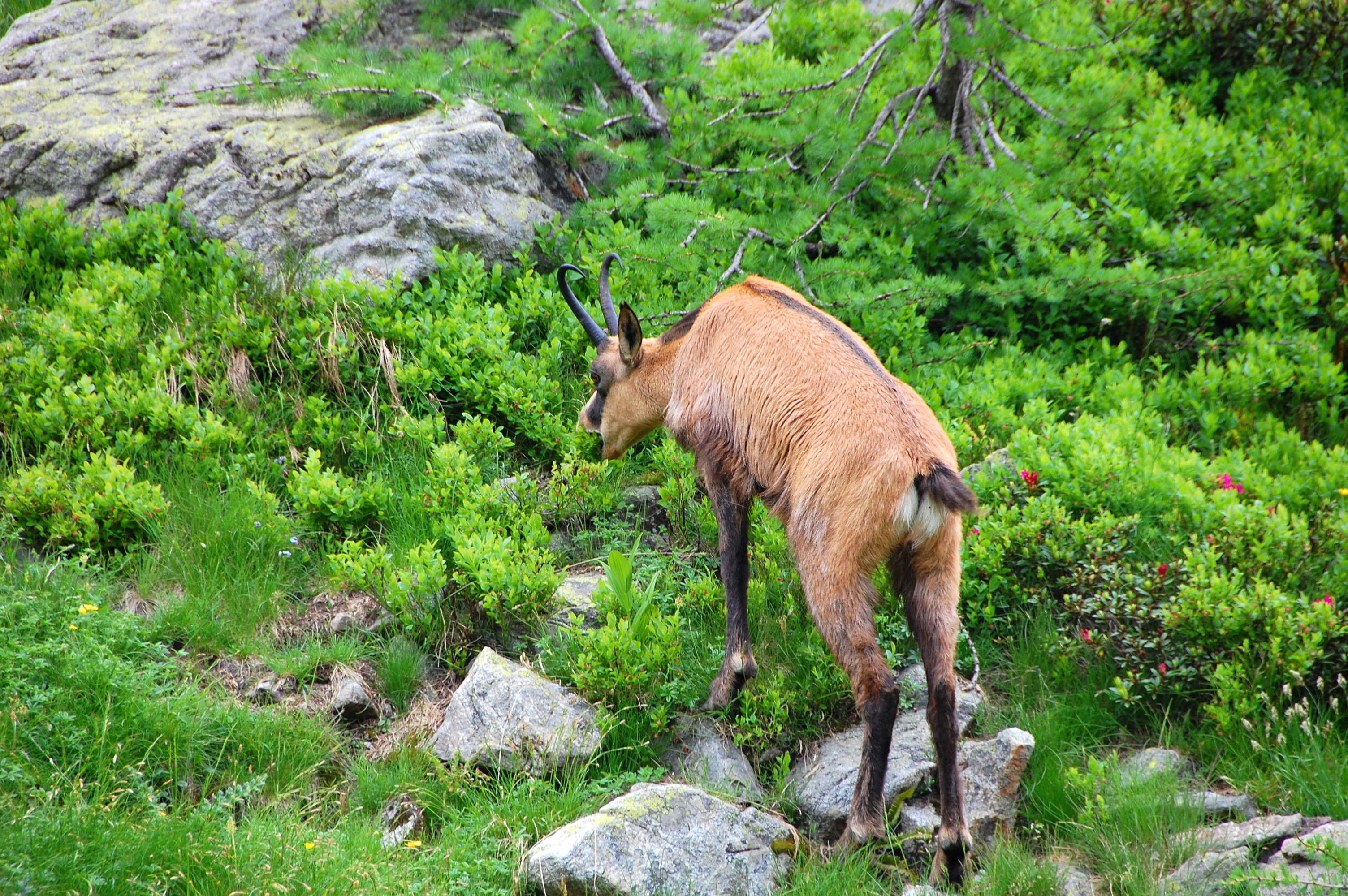 Rebeco